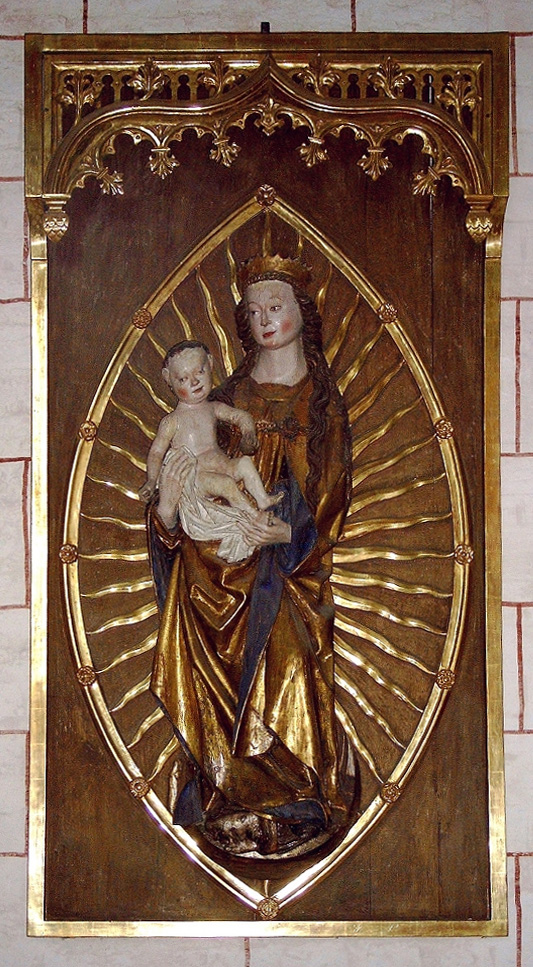 St.-Nikolai-Kirche in Burg (Fehmarn). Madonna auf der Mondsichel ist ein spätgotisches Werk (Anfang 16. Jahrhundert), Holz (Höhe 140 cm). Sie gehörte ursprünglich zu einem Altar, der 1846 zerstört wurde. Durch den Bildhauer Georg Matthiesen erhielt sie (1939-49) einen neuen Schrein mit Maßwerk und Strahlenkranz